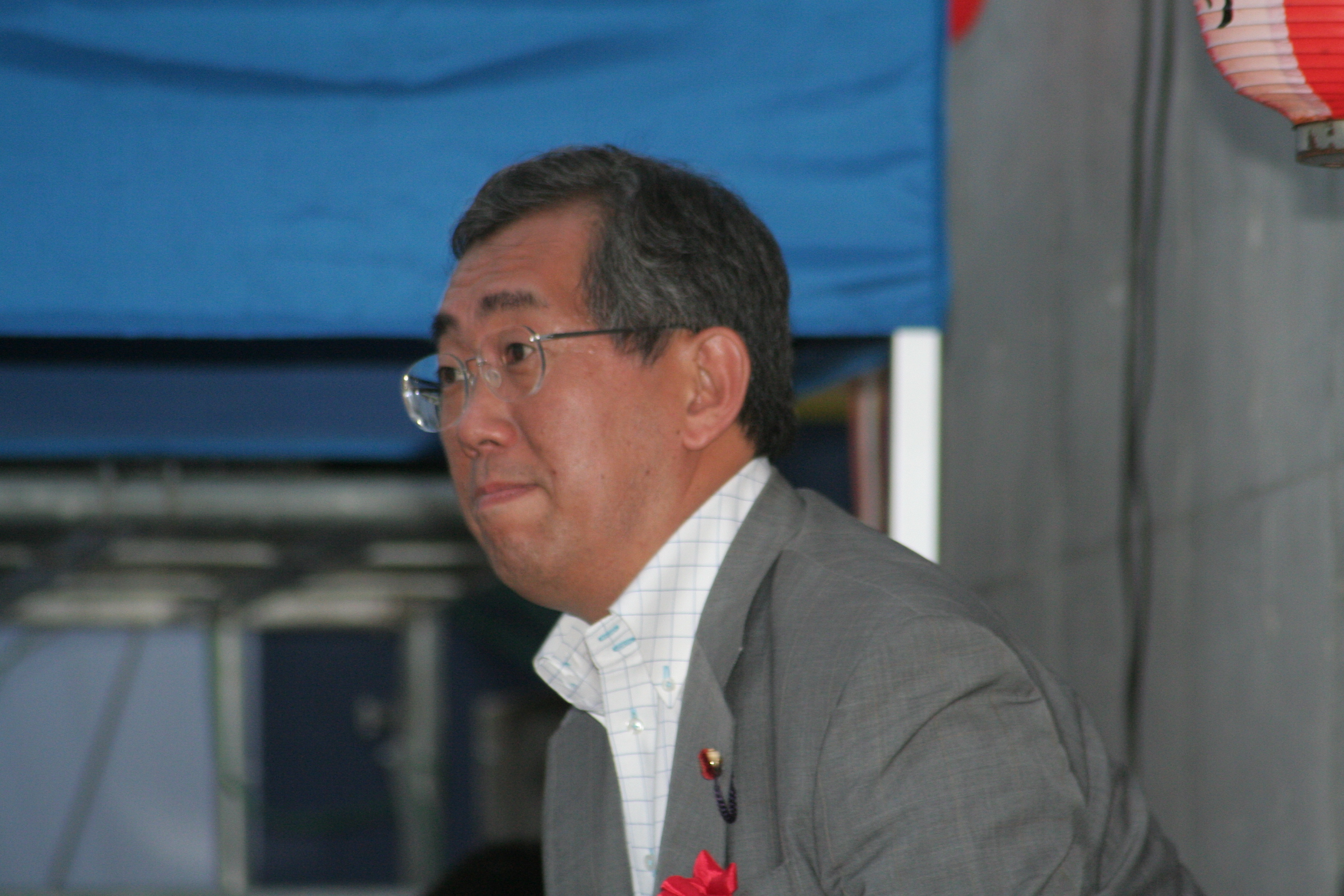 日本の兵庫県の政治家達。お夏清十郎祭にて撮影。松本剛明、戸井田徹、石見利勝の3人。 松本剛明。